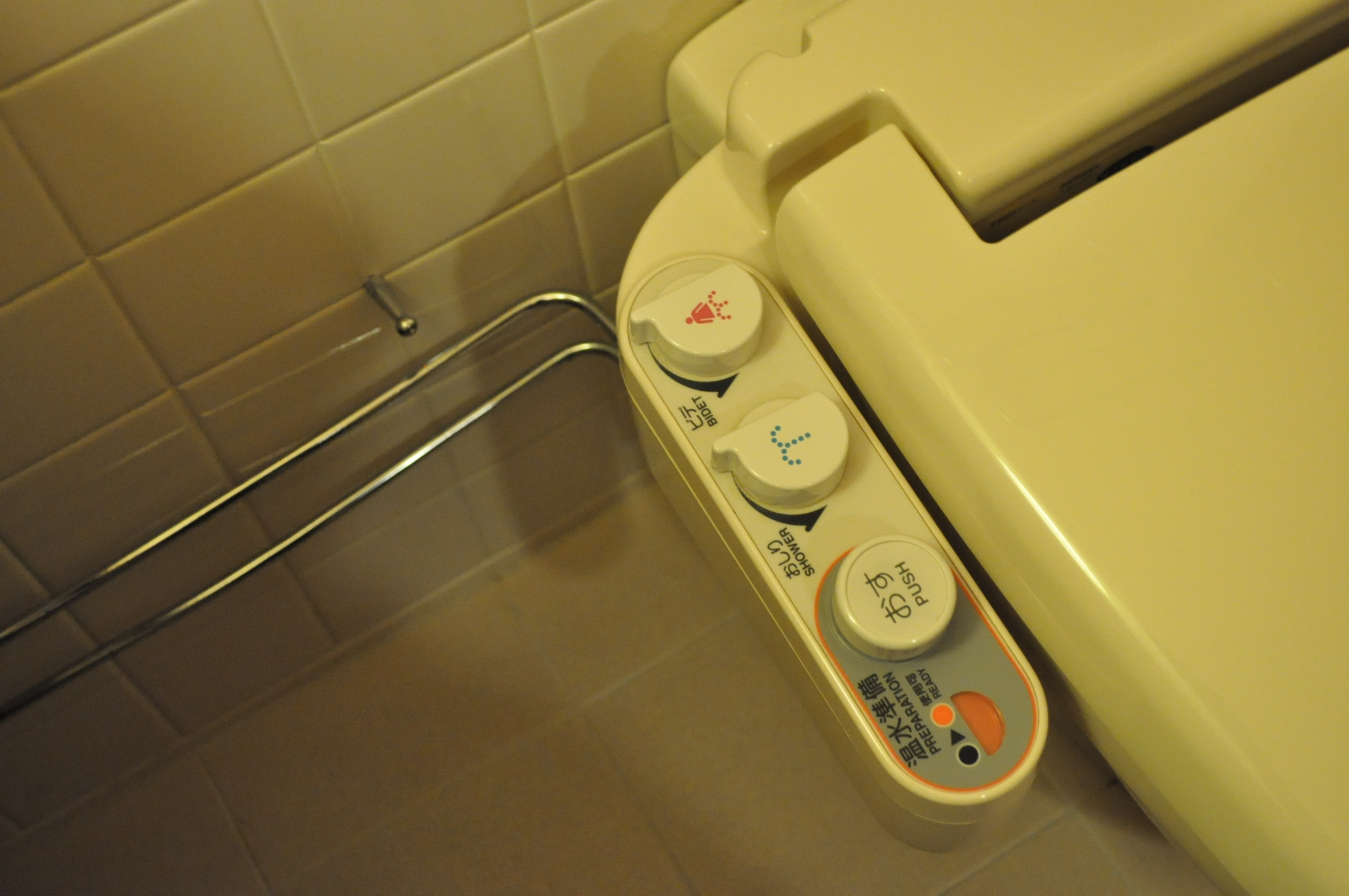 INAXのシャワートイレU3Eシリーズ。給湯・給水配管が直接繋がっている様子が確認できる。